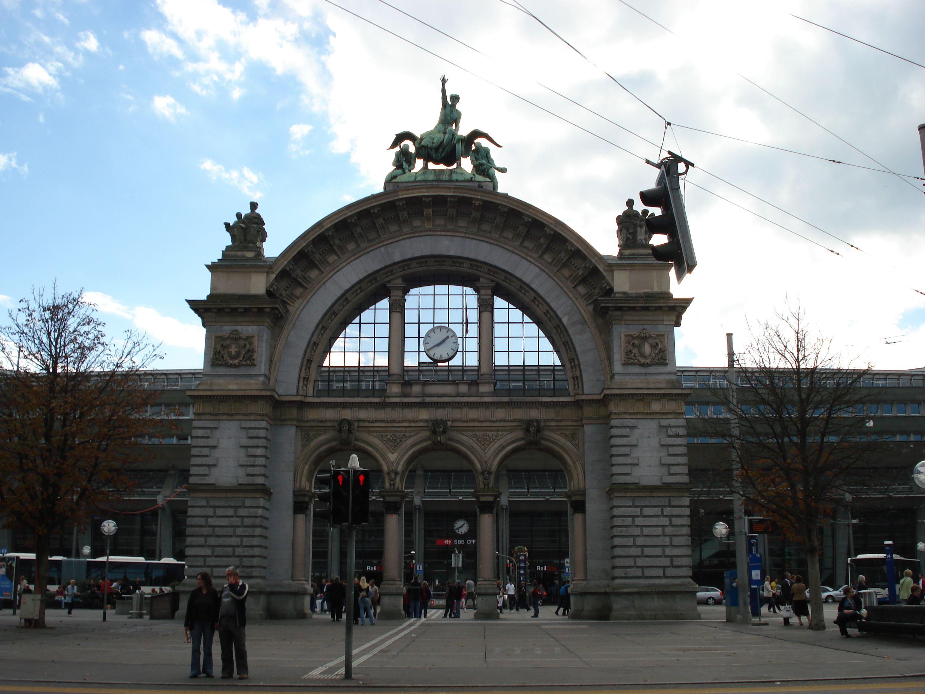 Hauptbahnhof Luzern, altes Bahnhofsportal